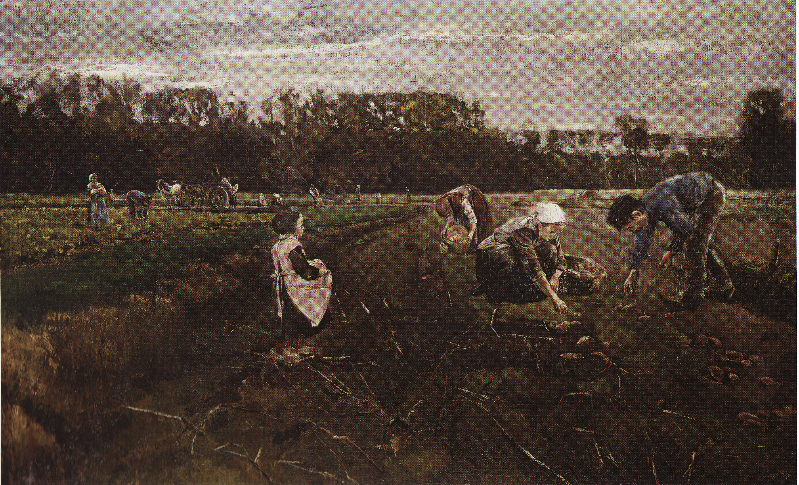 Kartoffelernte von Barbizon, Öl auf Leinwand, museum kunst palast